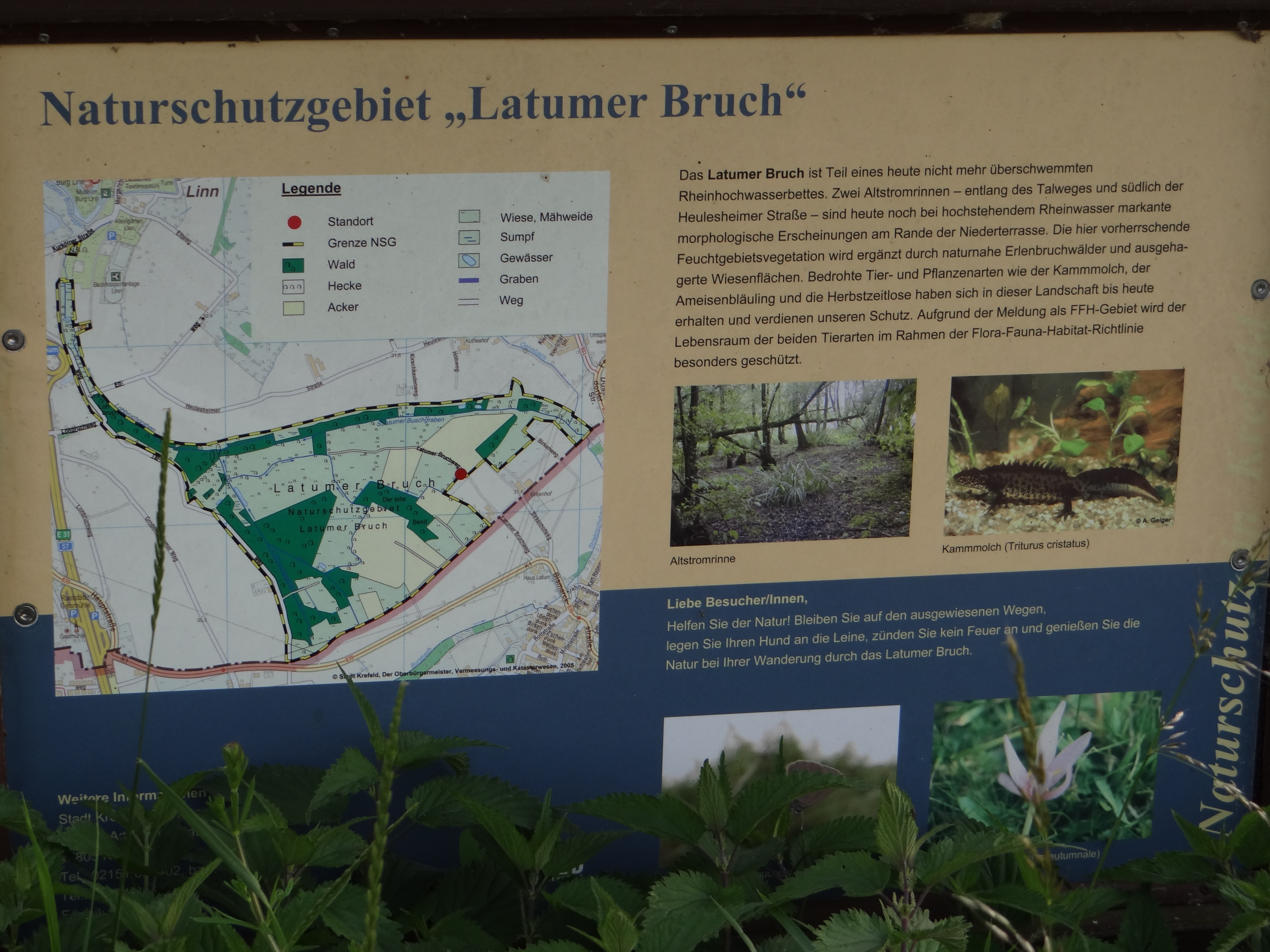 Naturschutzgebiet „Latumer Bruch“ zwischen Krefeld-Linn und Meerbusch-Lank-Latum, Infotafel